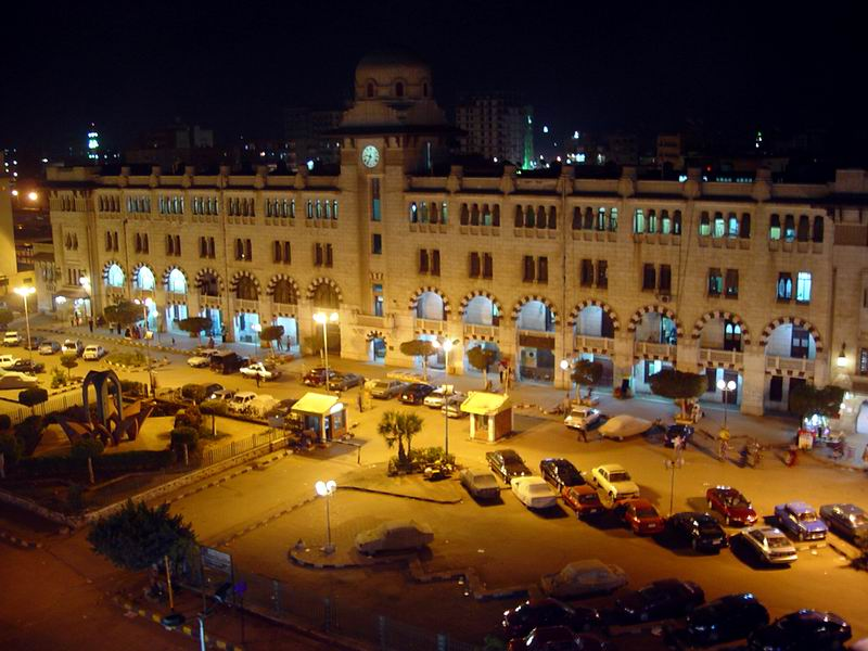 محطة القطارات، طنطا